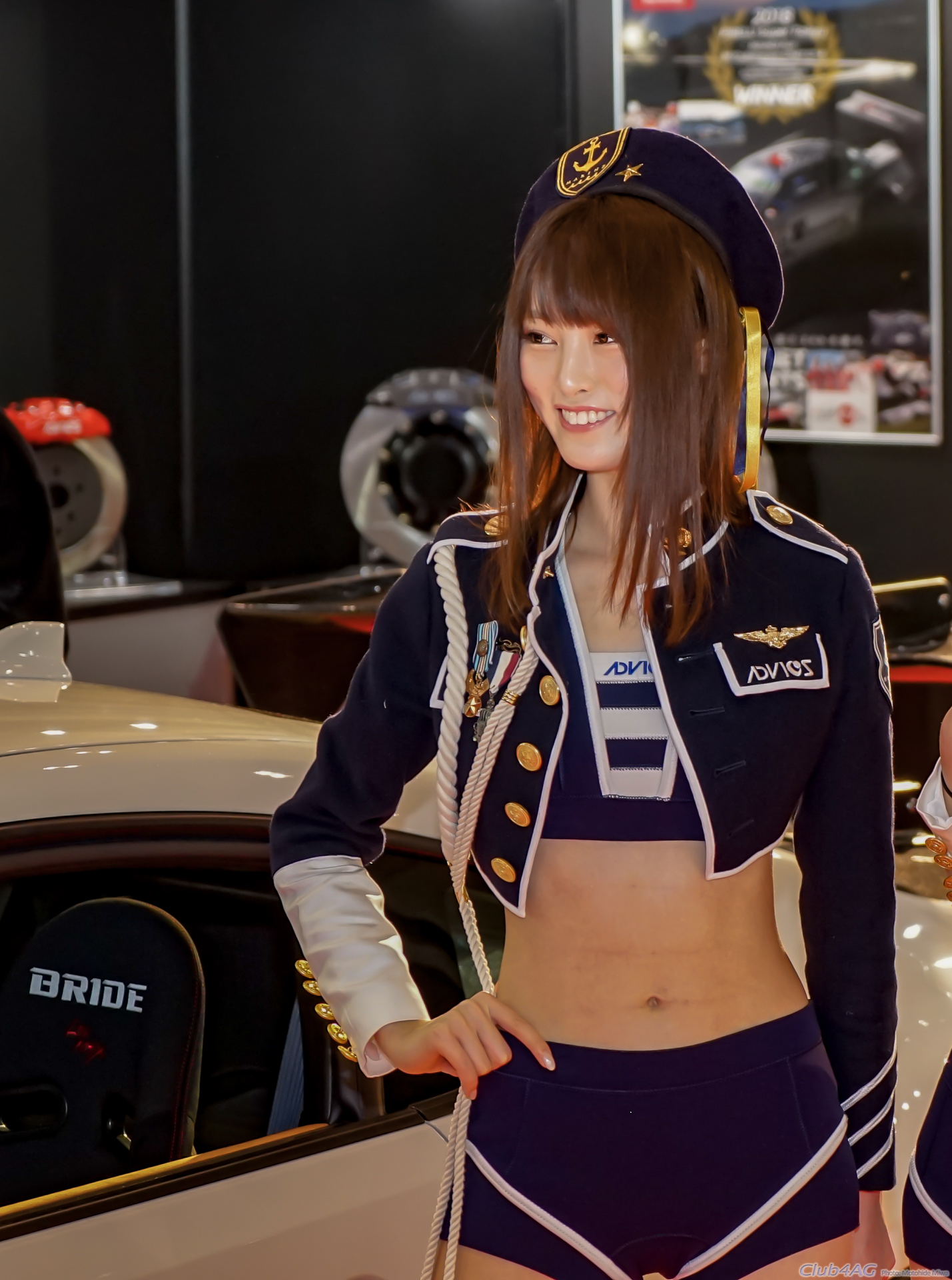 Tokyo Auto Salon 2019